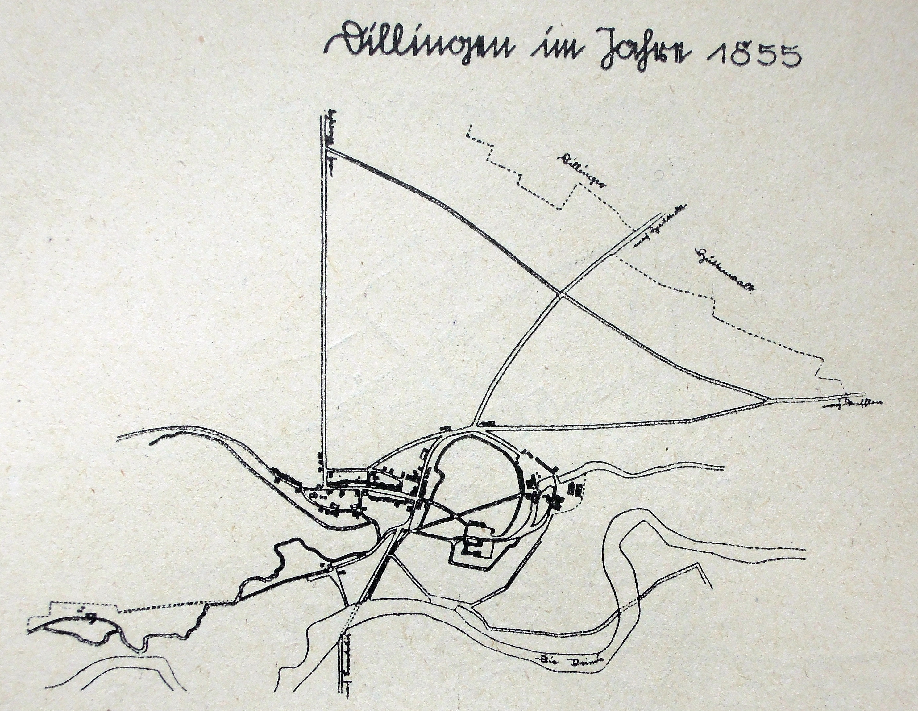 Karte von Dillingen/Saar im Jahr 1855